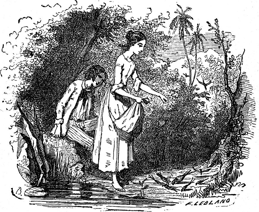 Paul and Virginie (1787) by Bernardin de Saint-Pierre (1737-1814)